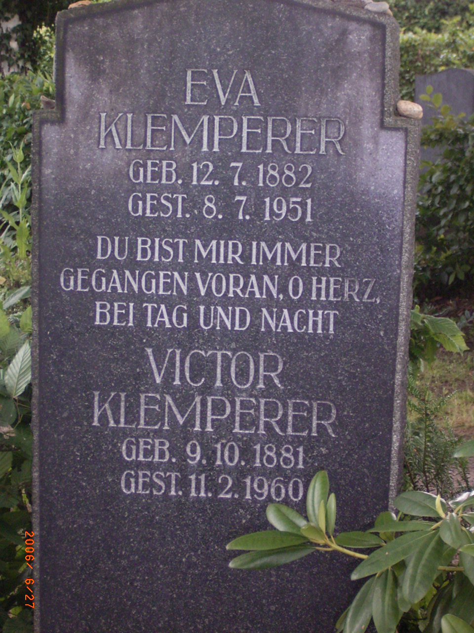 Grabstein Victor Klemperers auf dem Friedhof in Dresden-Dölzschen